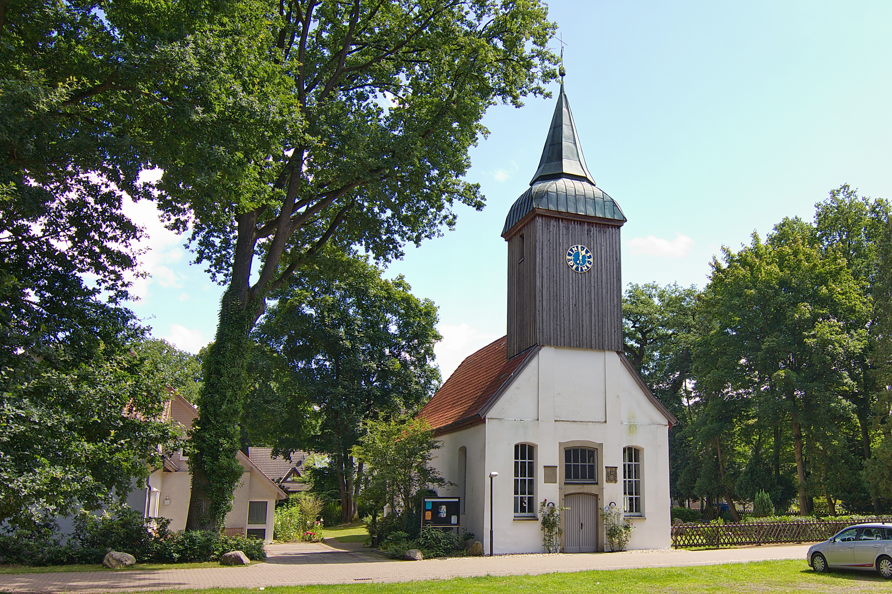 Die St. Thomas und Maria-Kirche wurde um 1300 als Burgkapelle errichtet und 1424 von der Familie von Hodenberg grundlegend erneuert und als Betkapelle genutzt.